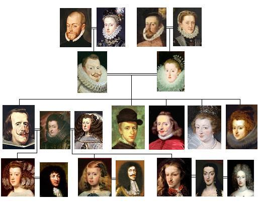 Árbol familiar de los últimos Habsburgos españoles, en la cuarta fila de izquierda a derecha observamos a la infanta María Teresa de Austria con su esposo Luis XIV; la infanta Margarita Teresa y su esposo el emperador Leopoldo I; y finalmente el rey Carlos II el Hechizado con sus dos esposas: La primera María Luisa de Orleans y la segunda Mariana de Neoburgo.